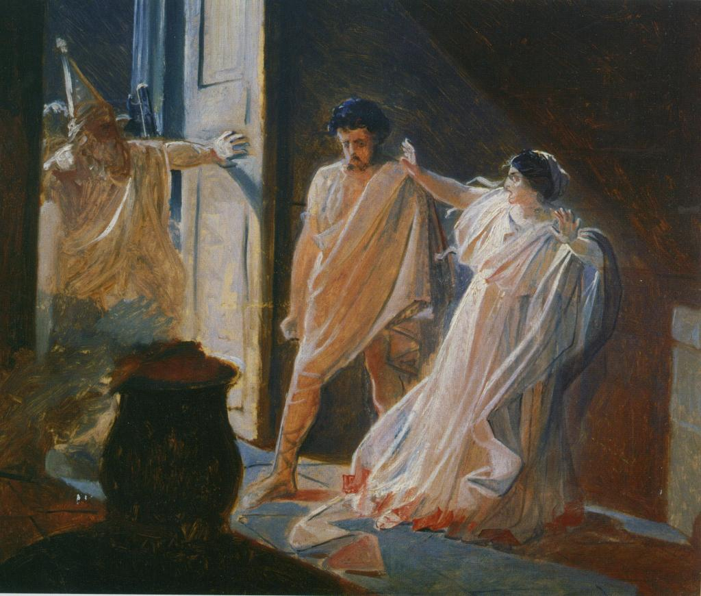 Любовь весталки. 1857-1858